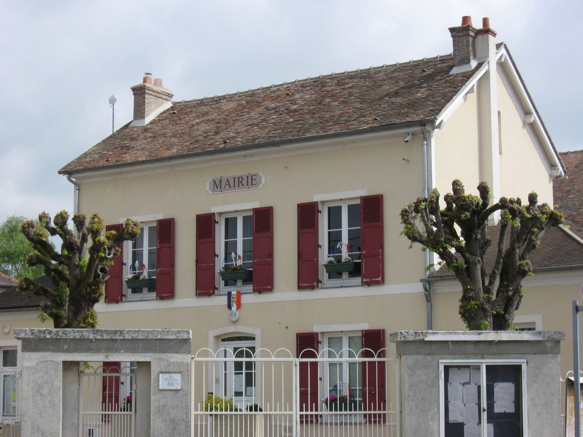 Mairie de Moisenay. (Seine-et-Marne, région Île-de-France).